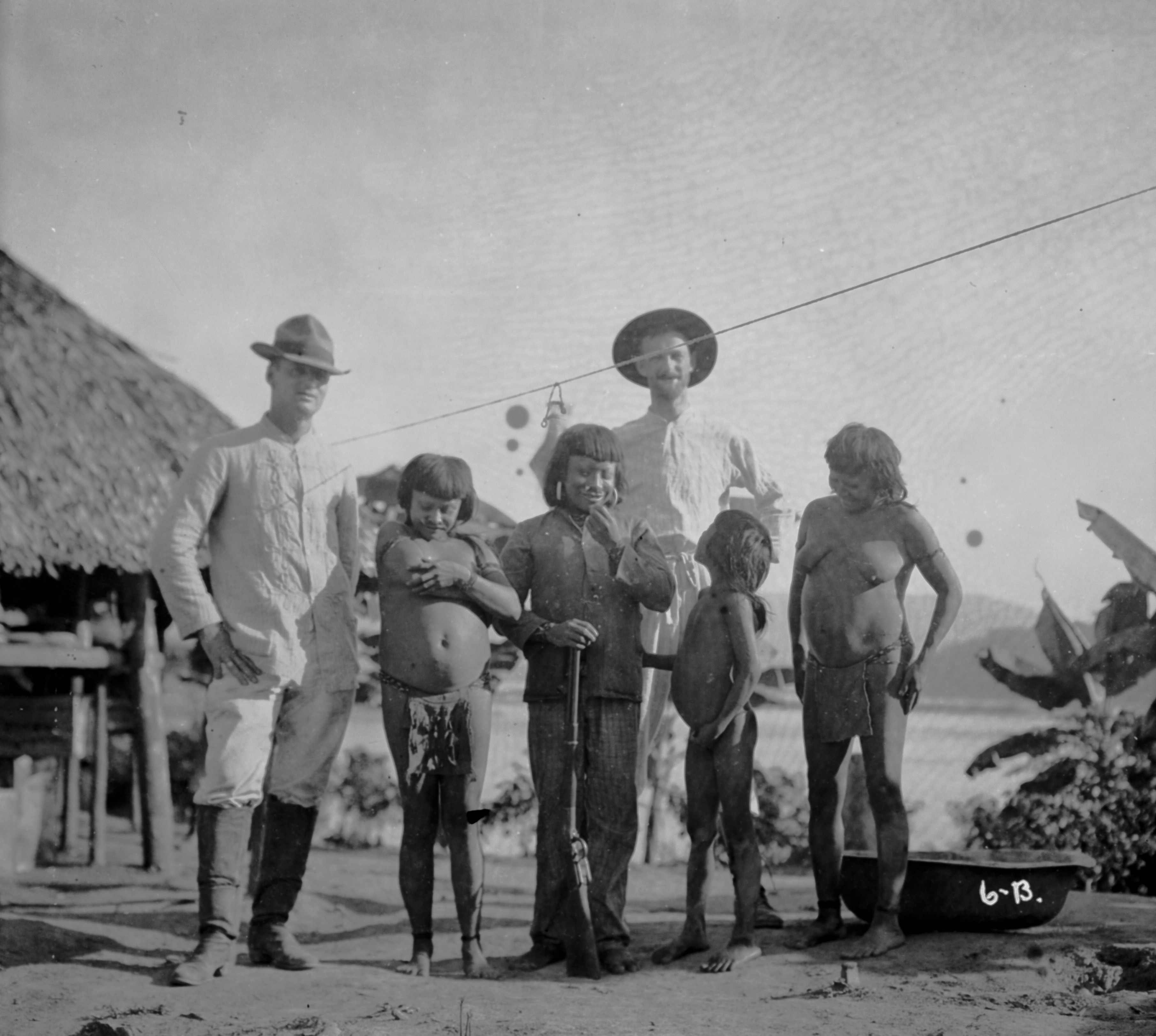 Obra que integra o acervo do Museu Paulista da USP. Coleção Dana Merrill.